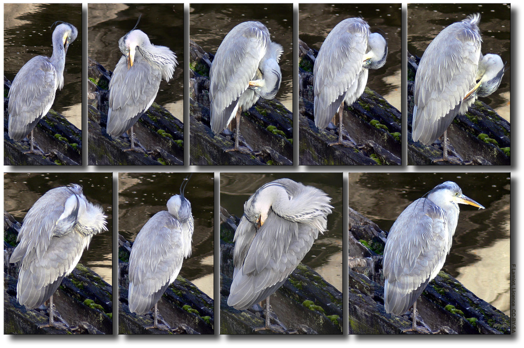 Description: Quelques unes des étapes du toilettage des plumes du héron cendré Ardea cinerea. Photo prise à Lille (nord de la France, Europe).